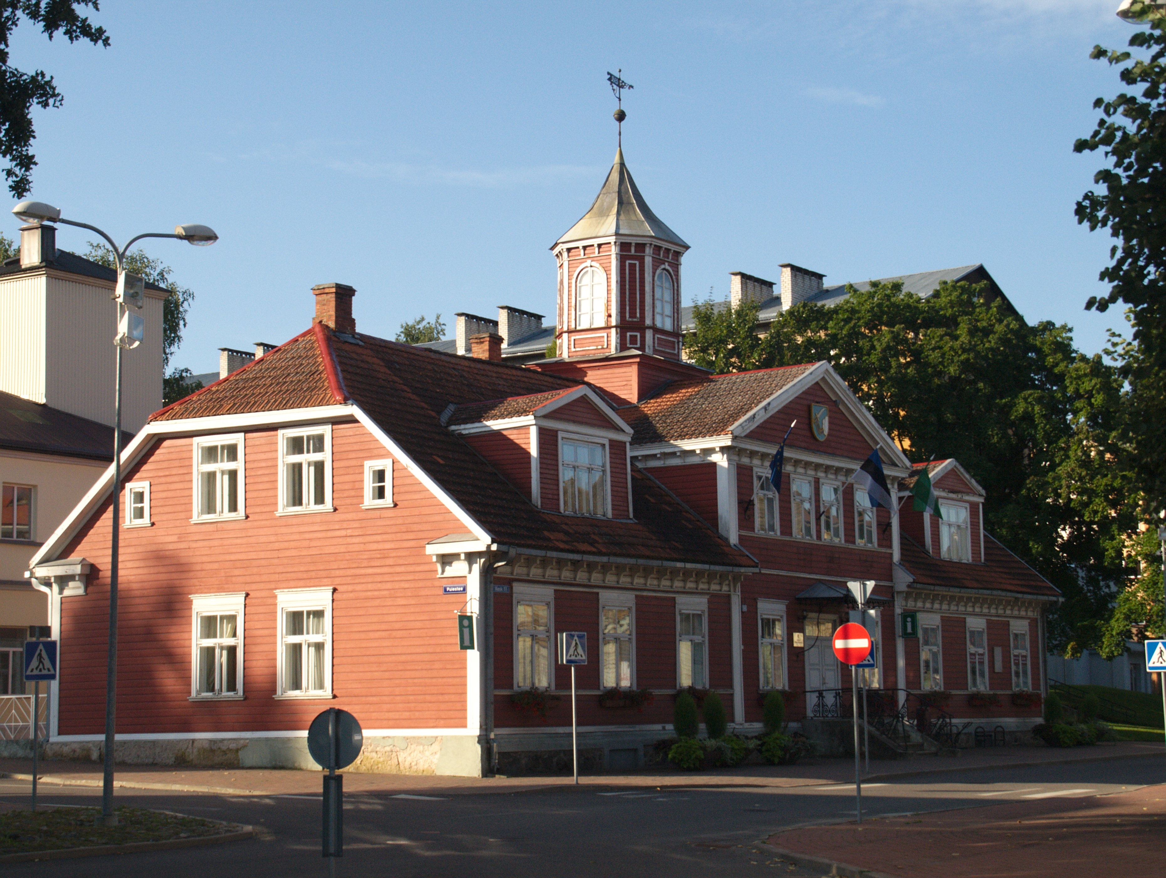 Valga Raekoda